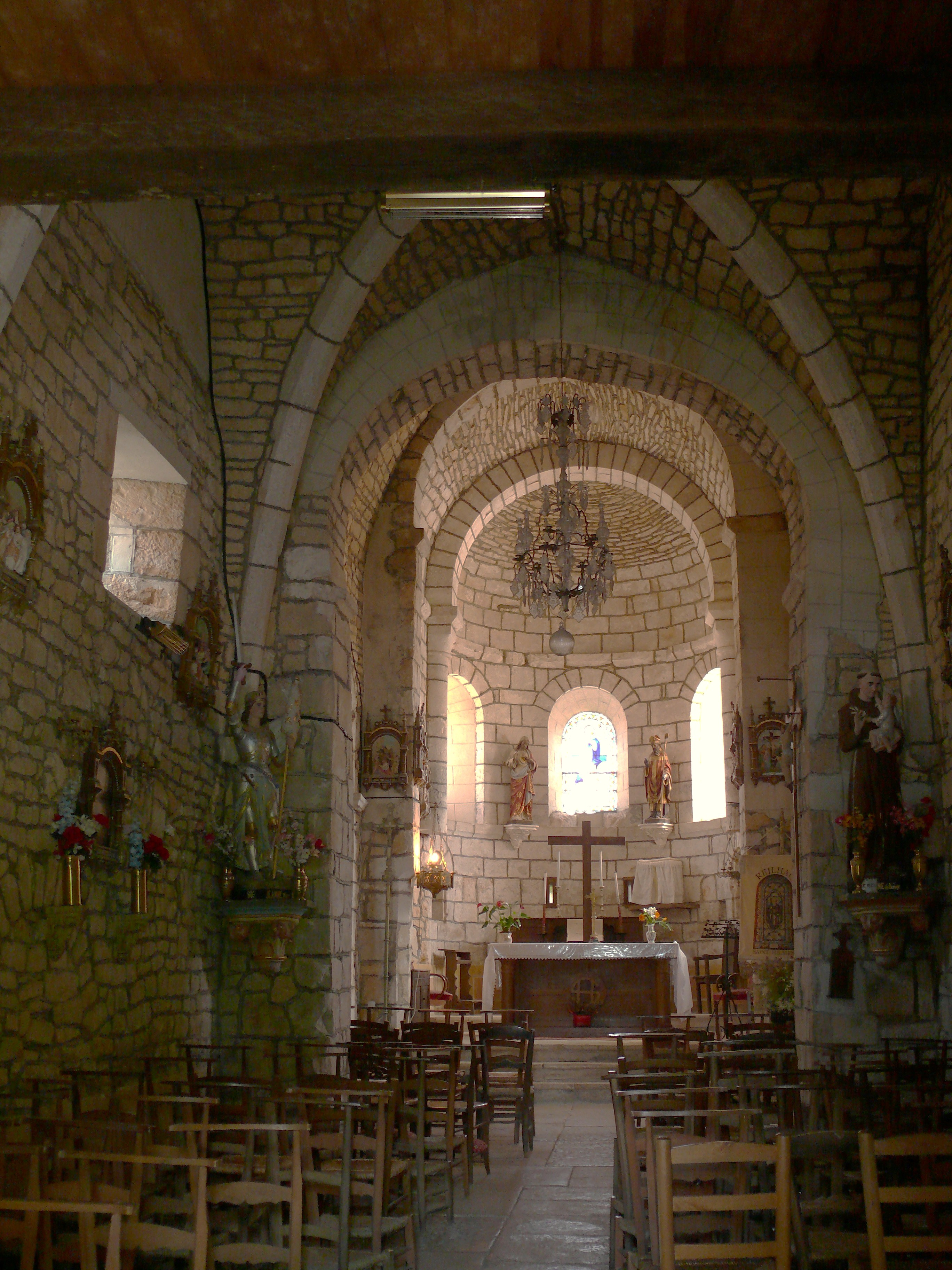 Reilhac - Eglise Saint-Hilaire - Nef